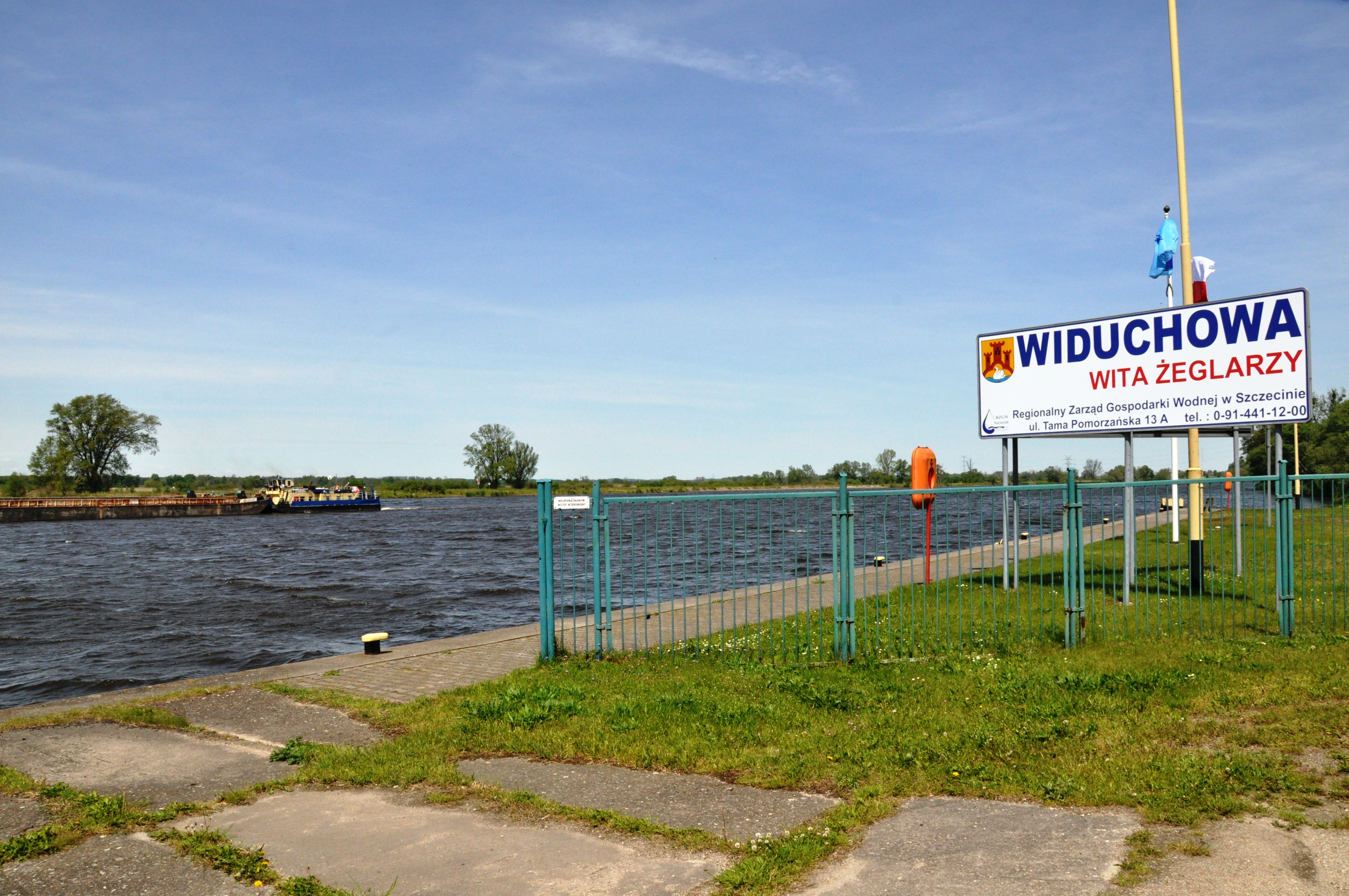 Miejsce odpaw obsady GPK Widuchowa